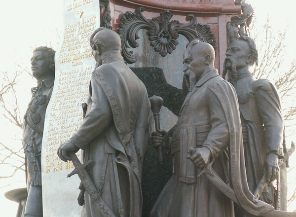 Фрагмент восстановленного памятника. У пьедестала стоят (слева на право) неформальный казацкий гетман — Грицько Нечёса (он же Григорий Потёмкин) и три первых атамана Черноморского войска — Антон Головатый, Сидор Белый и Захарий Чепега.